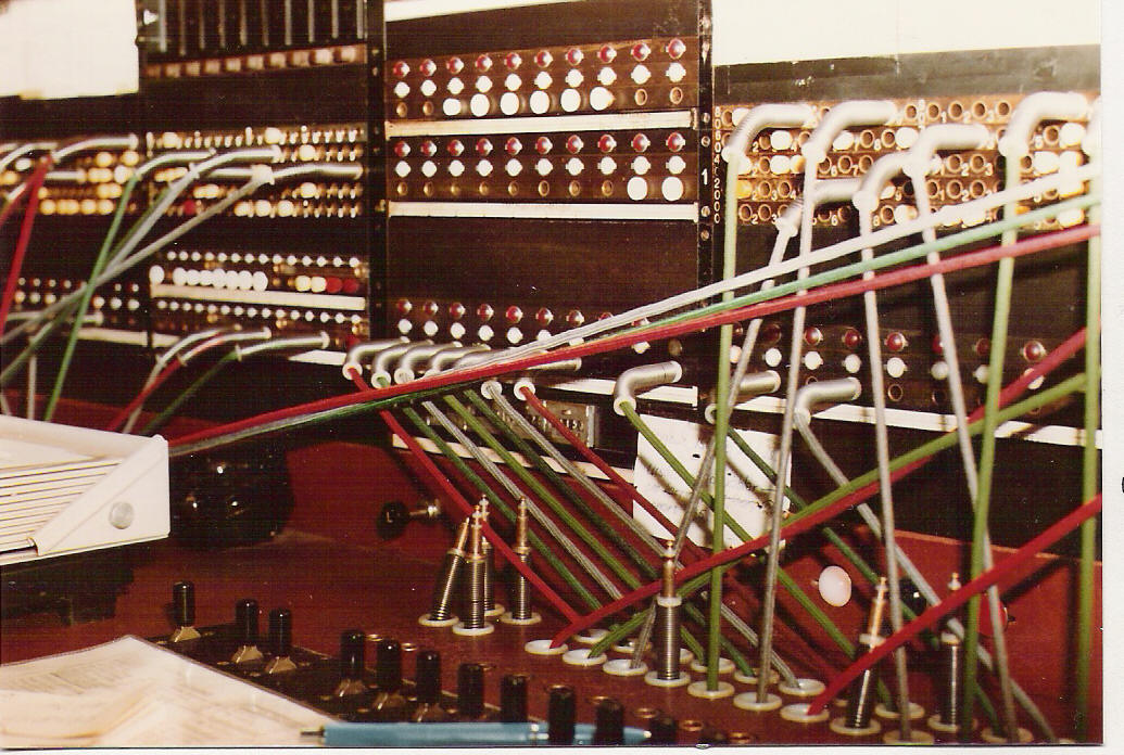 Description= Snörväxel OS54 Source= Fotograferad av mig själv Date= Sommaren 1981 Author= Lars Thorsell Permission= Bilden fri att användas av andra Other versions =